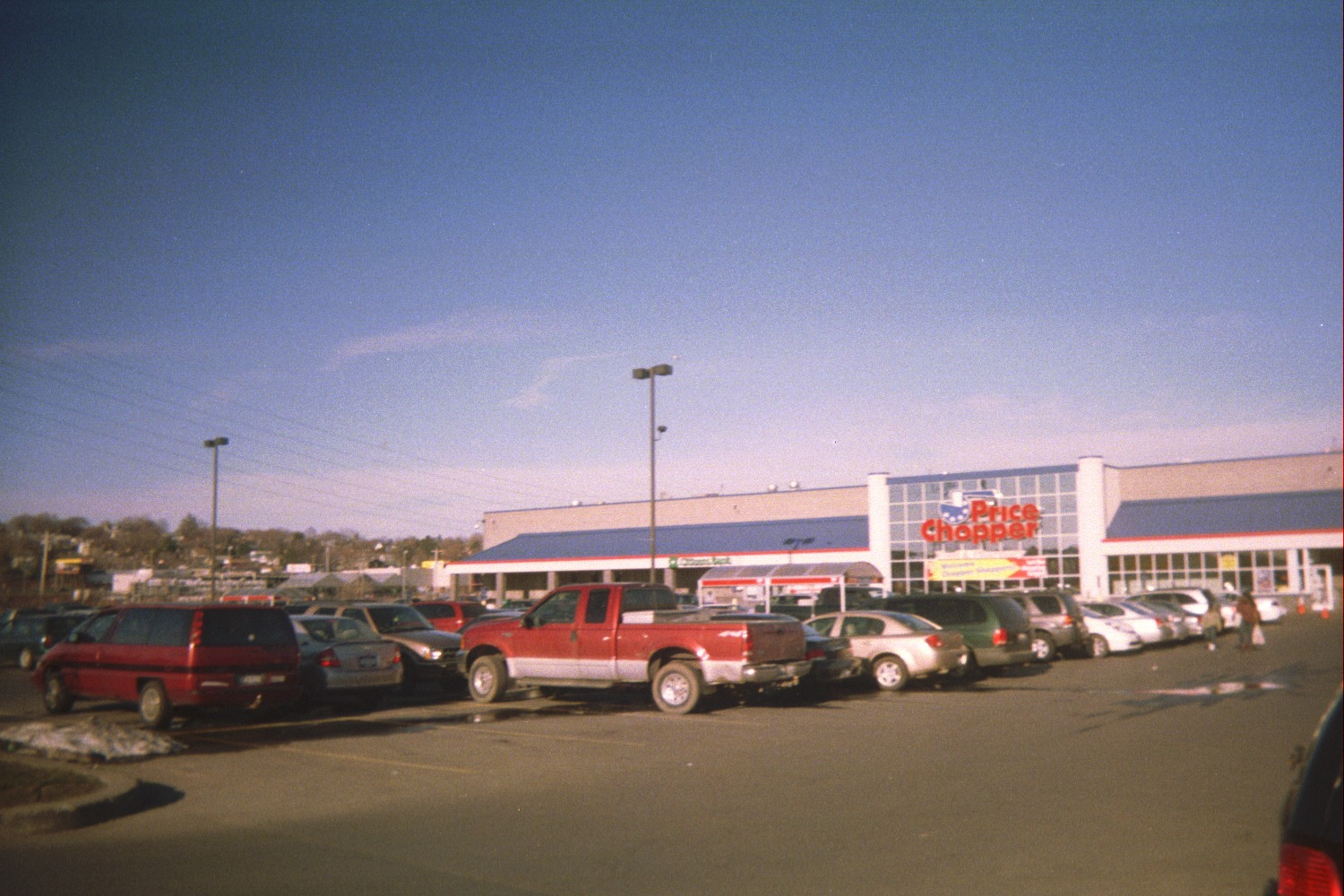 Erie Blvd E. and S. Midler Ave.